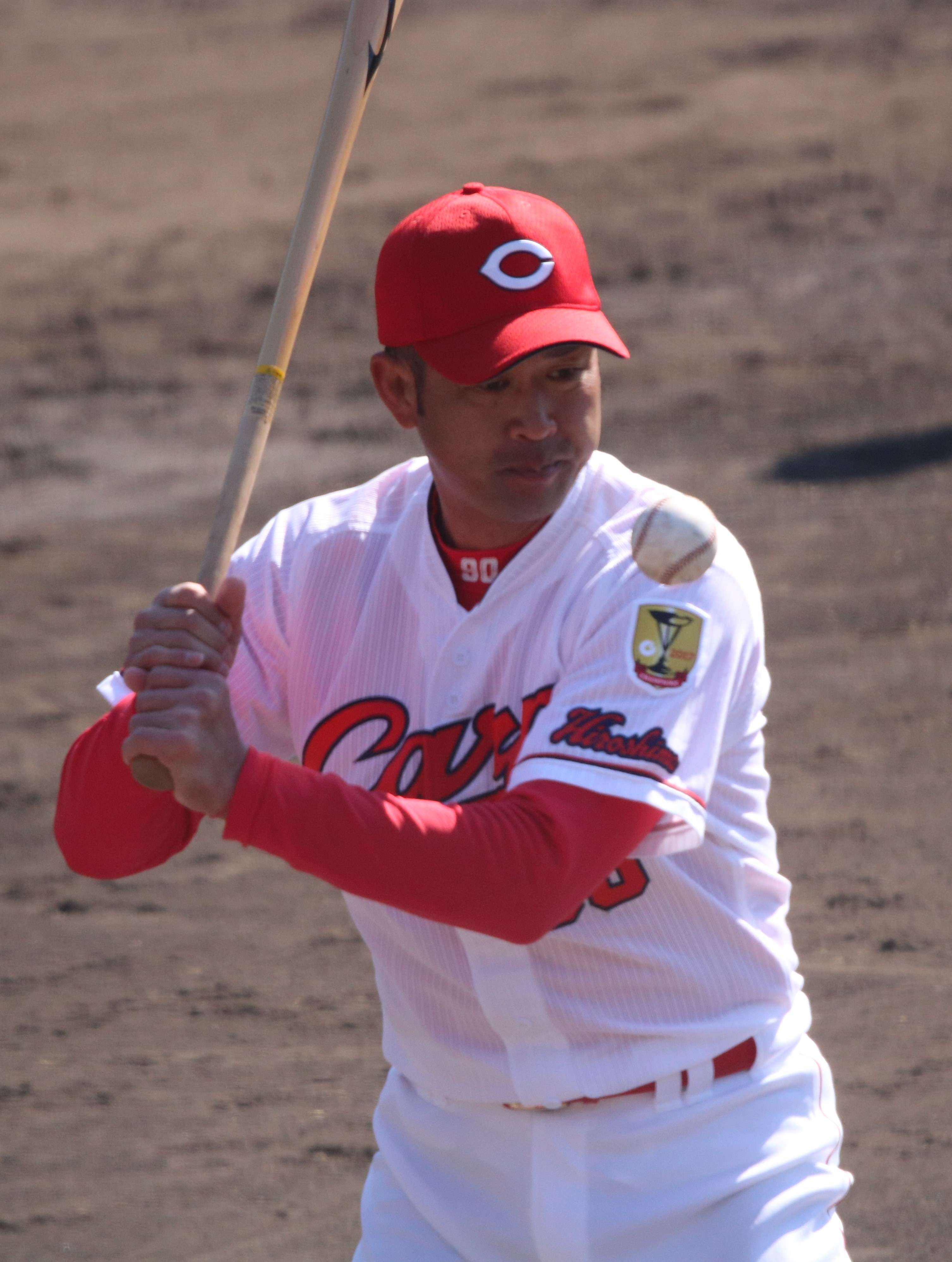 2018/2/11 天福球場